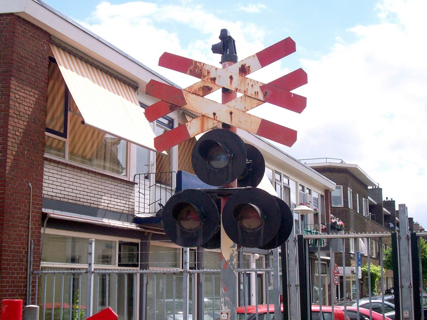 Oude AKI (Automatische Knipperlicht Installatie) zonder driehoekig schild. Terrein Spoorwegmuseum Utrecht